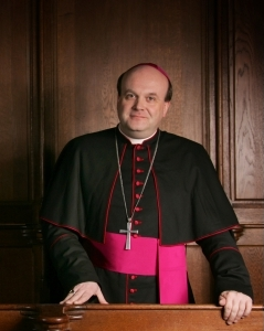 Johannes Harmannes Jozefus (Hans) van den Hende